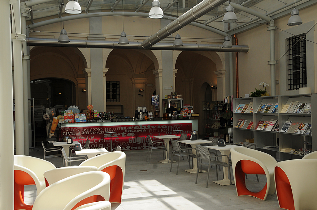 Il Caffè letterario della Biblioteca Giosuè Carducci, nel cortile dell'antico Palazzo Mauri